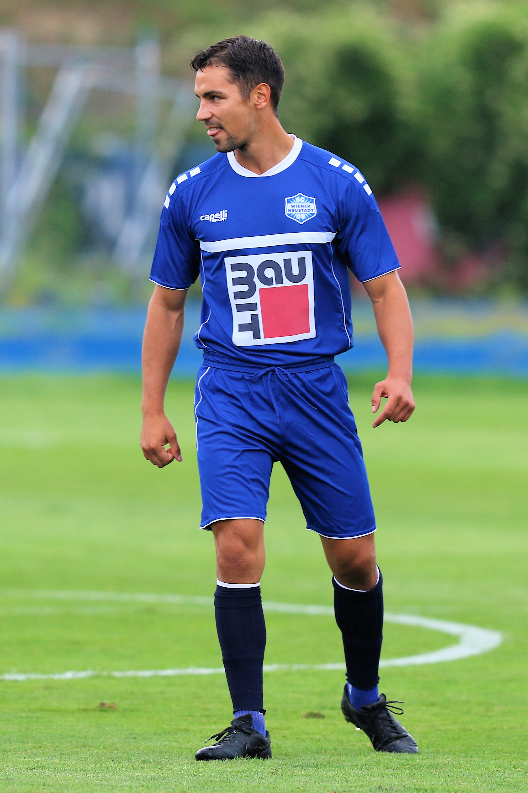 Meisterschaftsspiel der Regionalliga Ost 2019/20 SC Wiener Neustdat (blaue Trikots) gegen SC Team Wiener Linien (rote Trikots) am 3. August 2019 3:1 (0:1). – Das Bild zeigt Luka Radulovic.